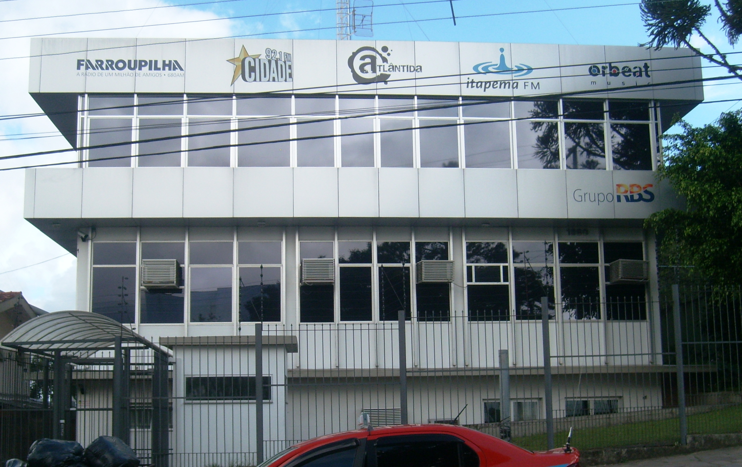 Sede da RBS Rádio em janeiro de 2010.